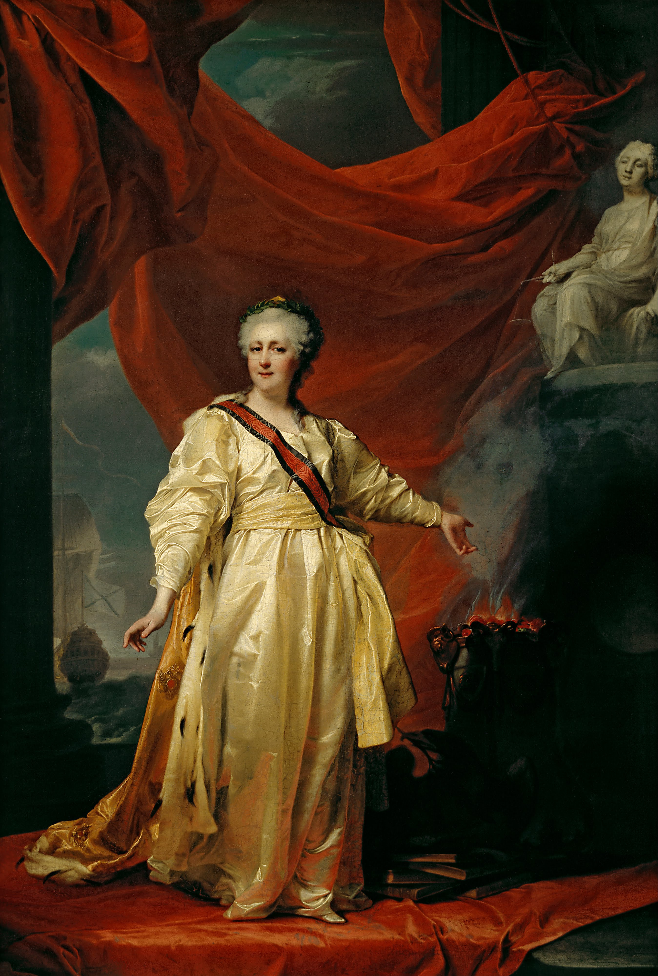 Варианты портрета находятся в Государственном Русском музее (1783), В Новосибирской областной картинной галерее (1783), в Киевском музее русского искусства (ок. 1783); копия (вариант?) – в Пензенской областной картинной галерее имени К. А. Савицкого.